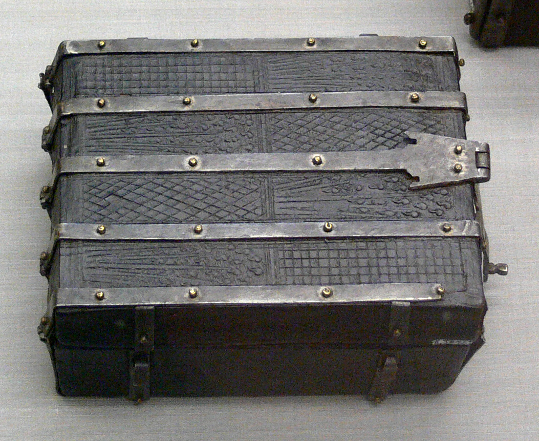 Buchkasten; Leder, gefärbt und geschnitten, Holzkern; Frankreich um 1480 Kunstgewerbemuseum Berlin, Inv. Nr. K 3071